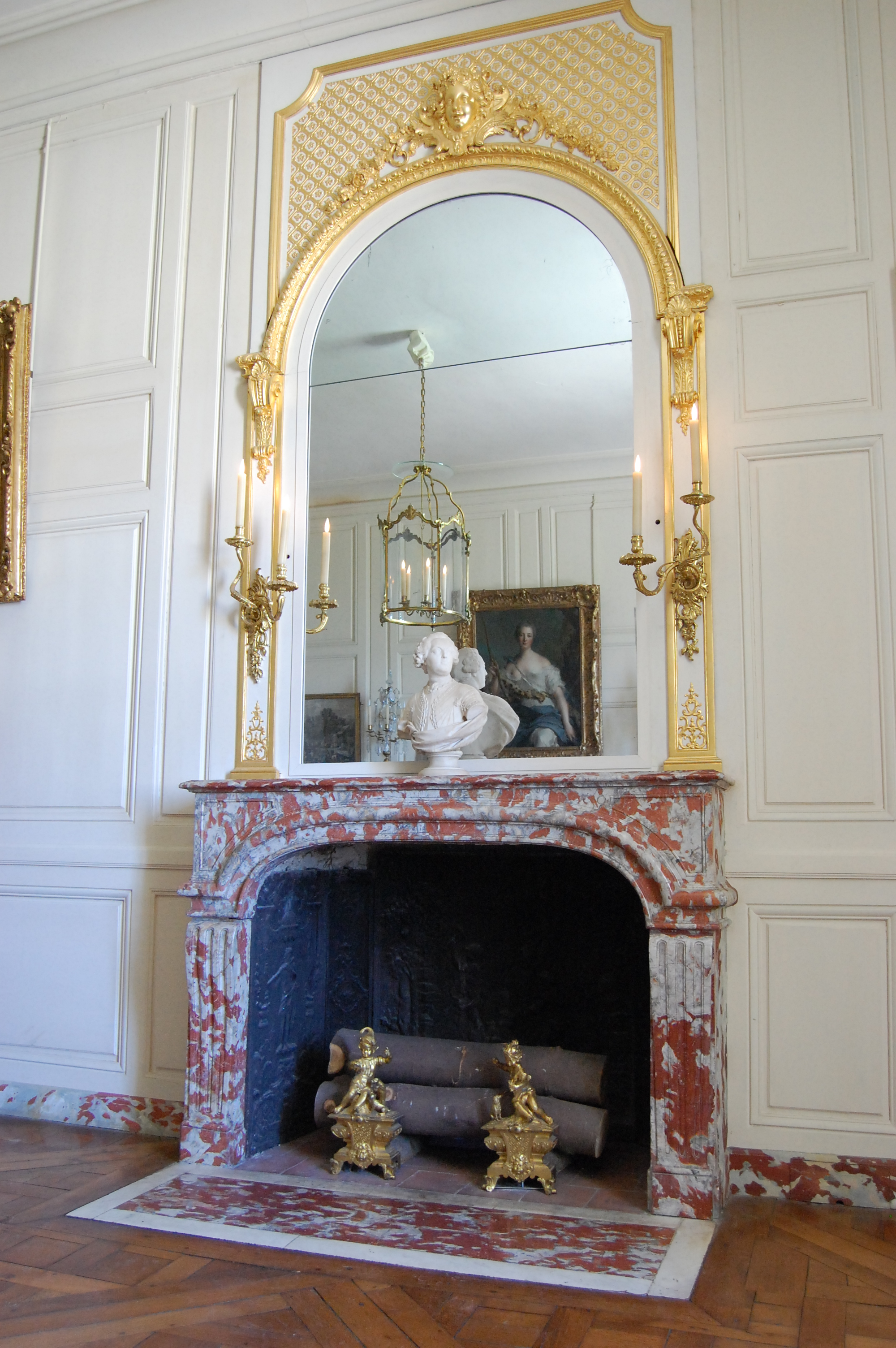 Appartement de la Pompadour, cheminée de l'antichambre, chenets